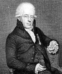 Portret van Rhijnvis Feith. Kopergravure (1825) door Philippus Velijn (1787-1836), naar het schilderij (1819) door Willem Bartel van der Kooi (1768-1836).